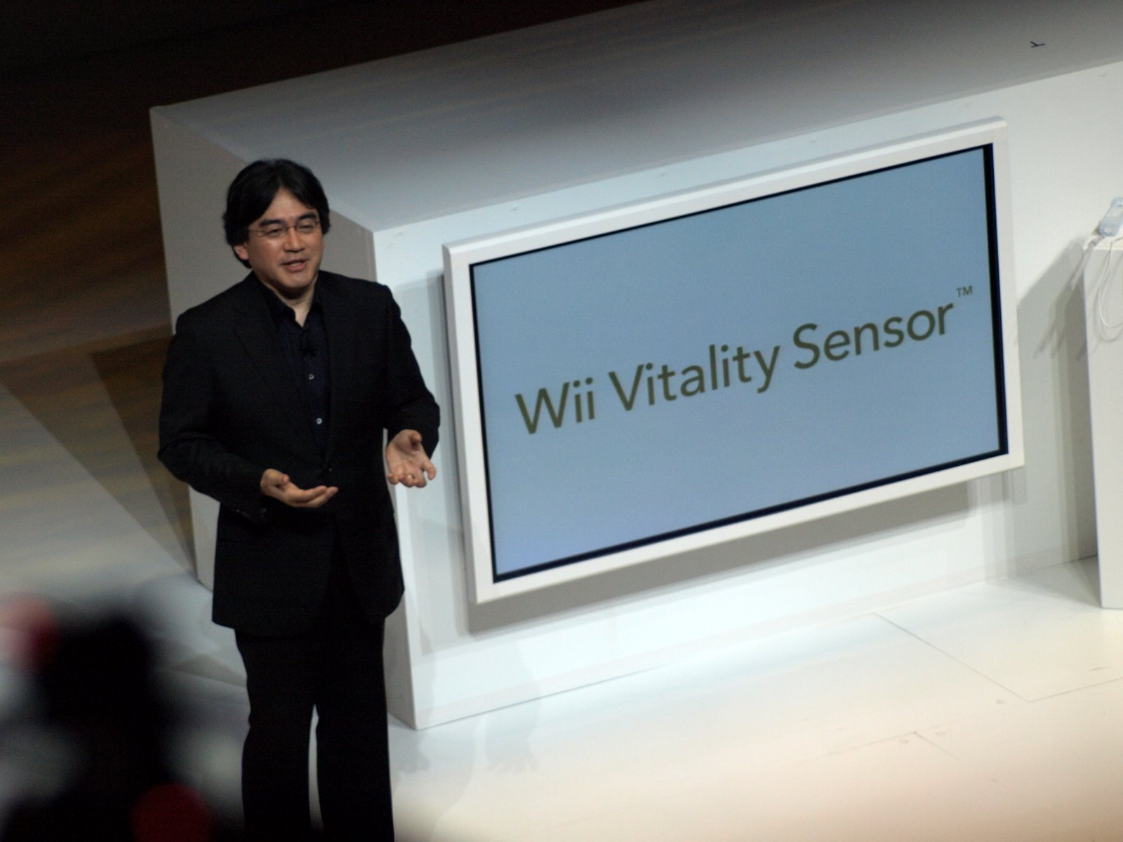 Satoru Iwata, presidente de Nintendo durante el E3 2009, presenta el proyecto Vitality Sensor.